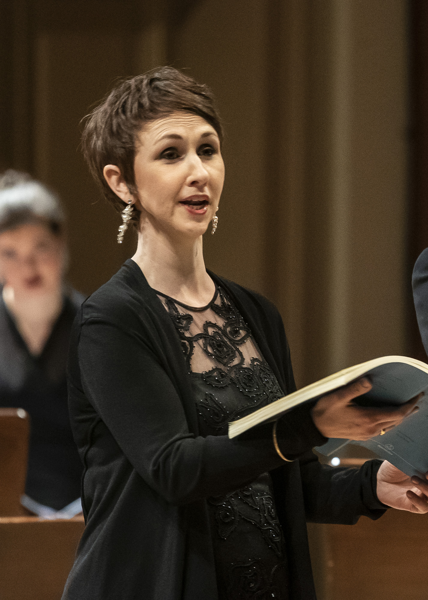 Hannah Morrison, J.S. Bach Weihnachts-Oratorium BWV 248, Praha, Rudolfinum, Collegium 1704, Peter Dijkstra dirigent, sólisté Hannah Morrison soprán, Maarten Engeltjes kontratenor, Benedikt Kristjansson tenor, Tobias Berndt bas